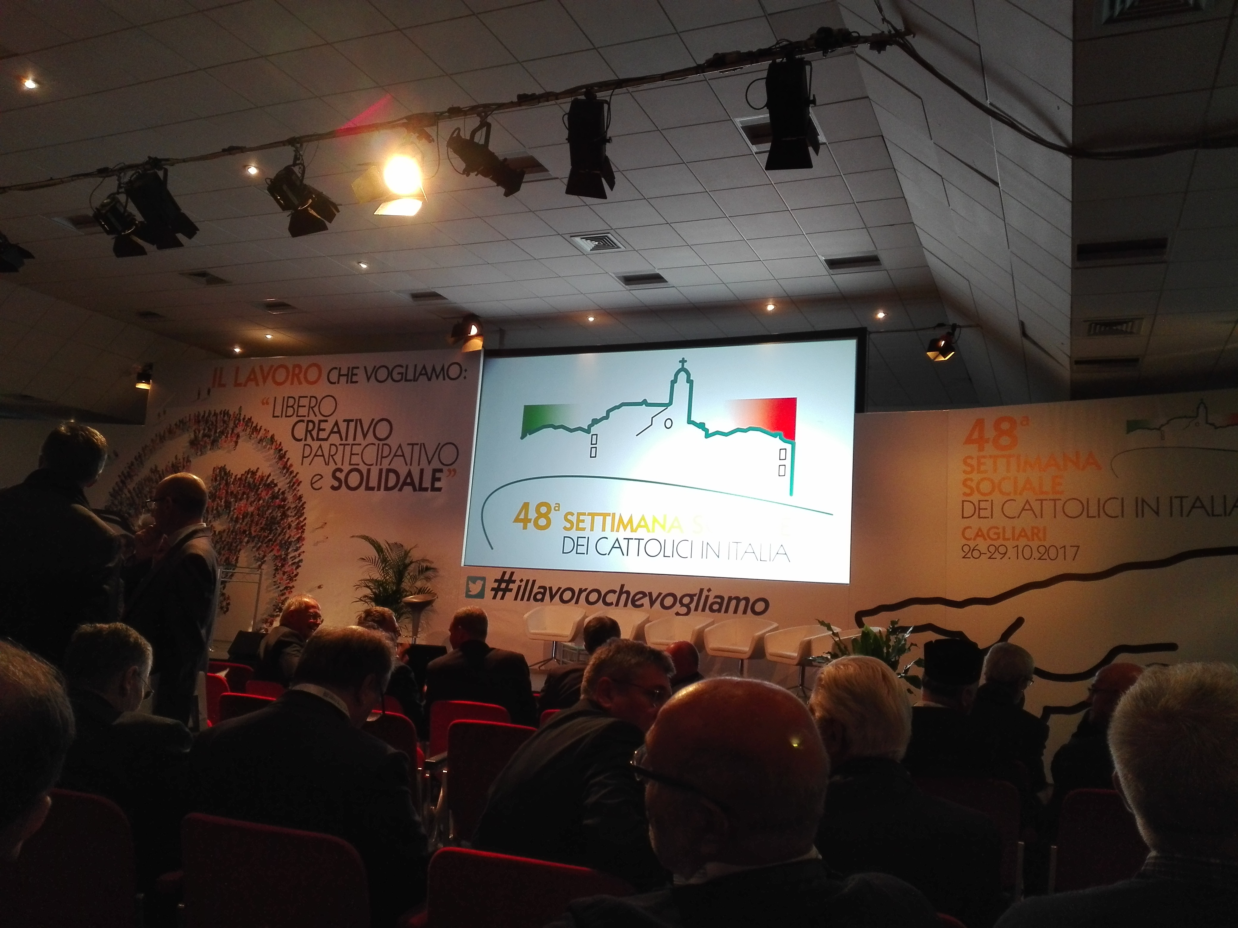 48° settimana dei cattolici italiani a Cagliari nella fiera dal 26 al 29 ottobre 2017